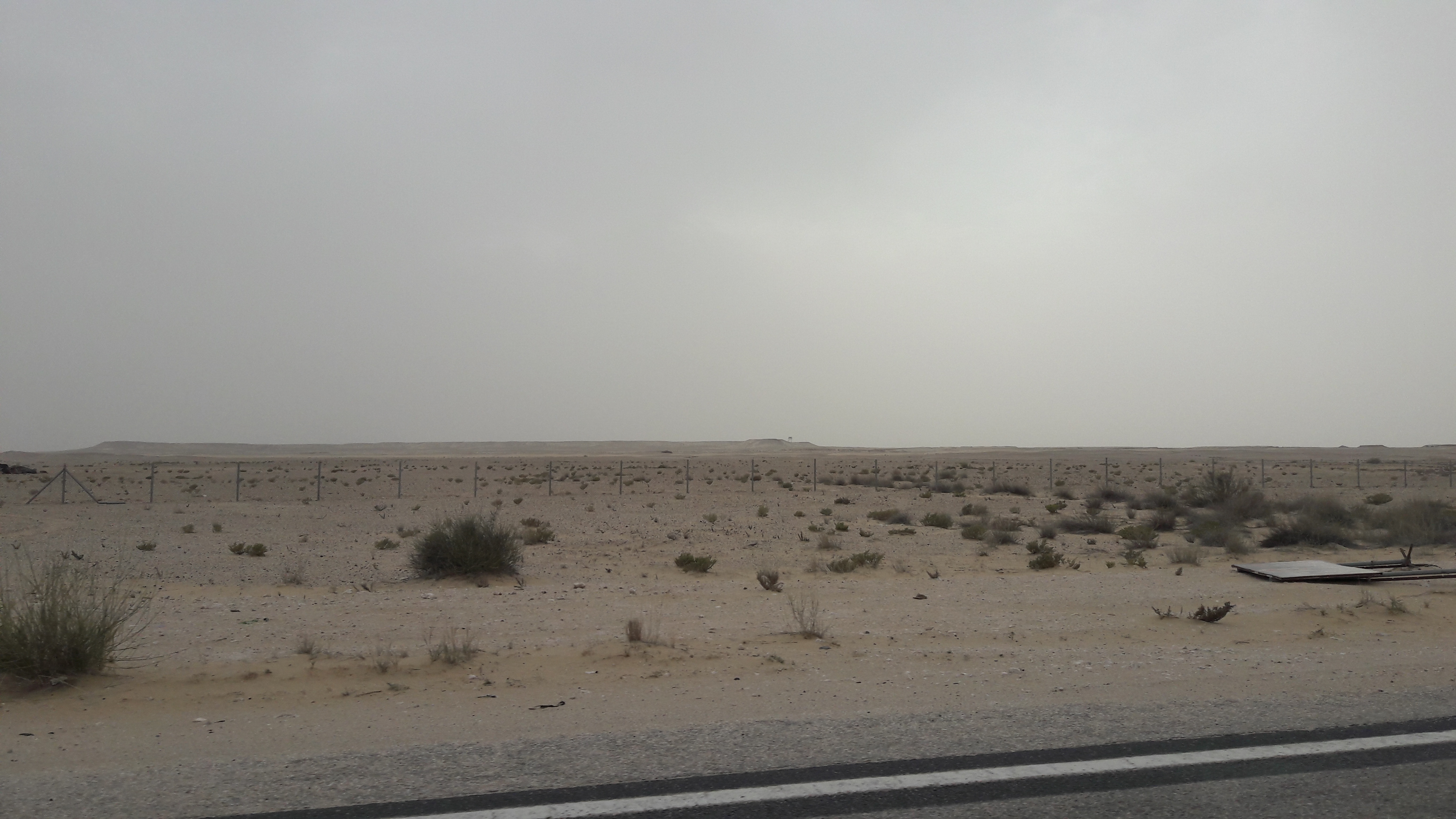 Al-Qalail Range depuis la route Qatar-EAU